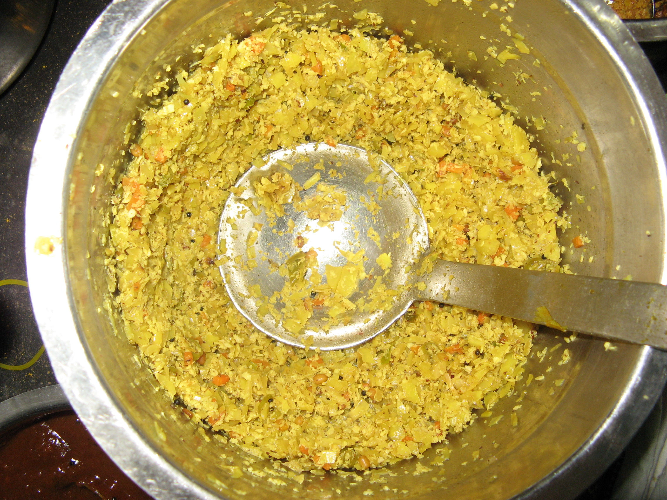 കാബേജ് തോരൻ